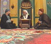 wamadat11